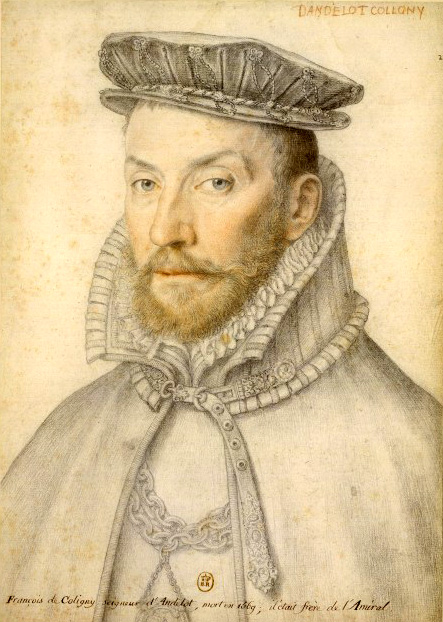 Portrait au crayon de François de Coligny d'Andelot. Recueil. Portraits dessinés de la Cour de France